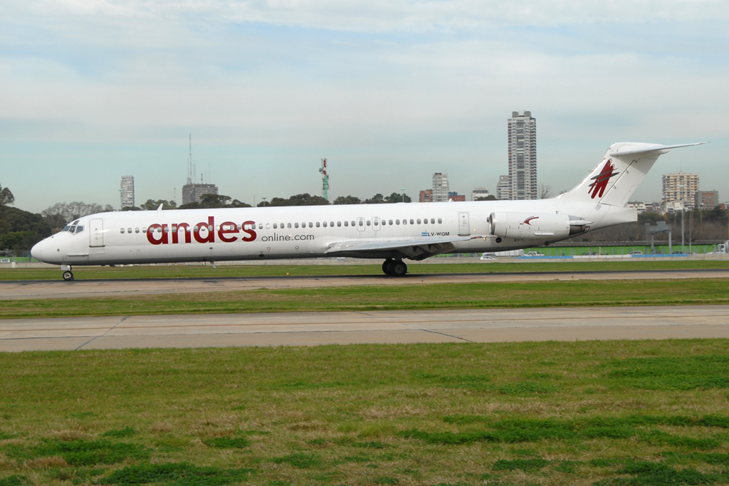 LV-WGM@AEP 11AUG14